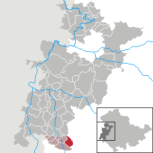 Kaltenlengsfeld in Thuringia - Wartburgkreis